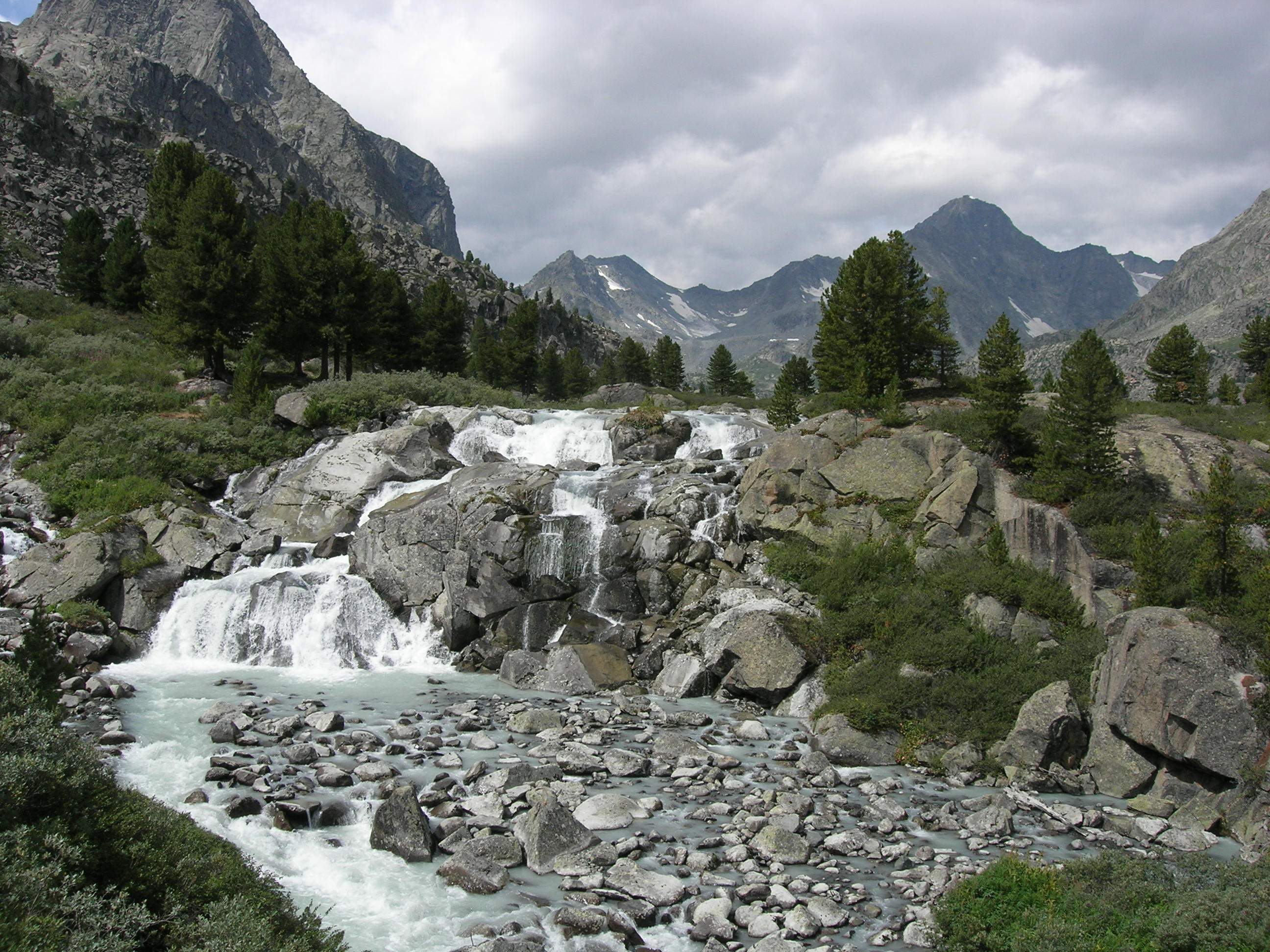 Каскад водопадов на реке Иолдо-Айры